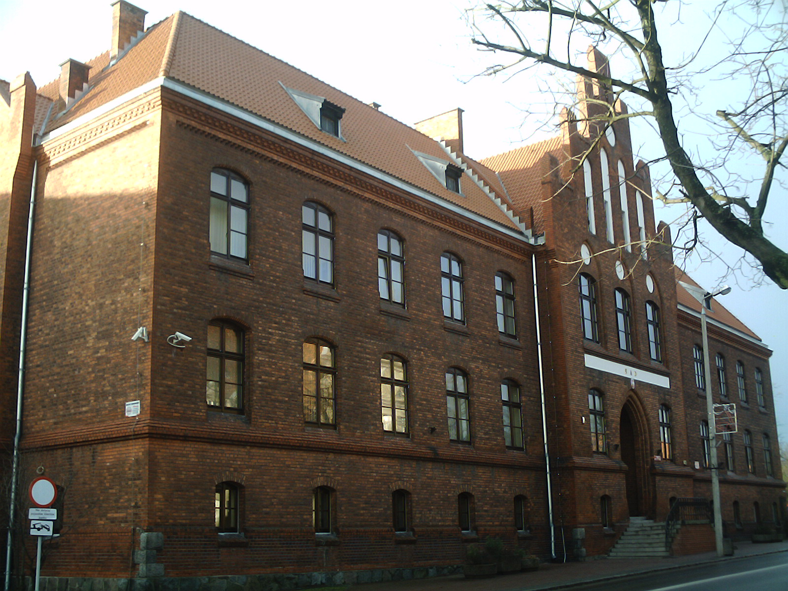 Mrągowo, ul. Królewiecka 55 - budynek Sądu Rejonowego, wraz z działką, na której budynek jest posadowiony (zabytek nr A-4514) Autor B.N.